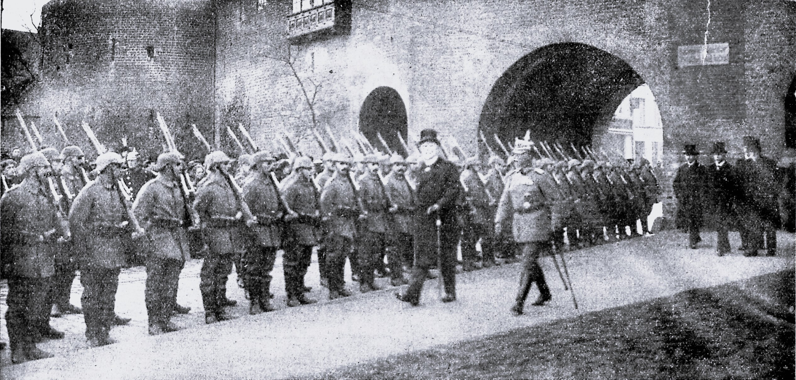 Übergabe zweier französischer Beutegeschütze. Bürgermeister Eschenburg und General v. Wright schreiten die Ehrenkompanie ab.